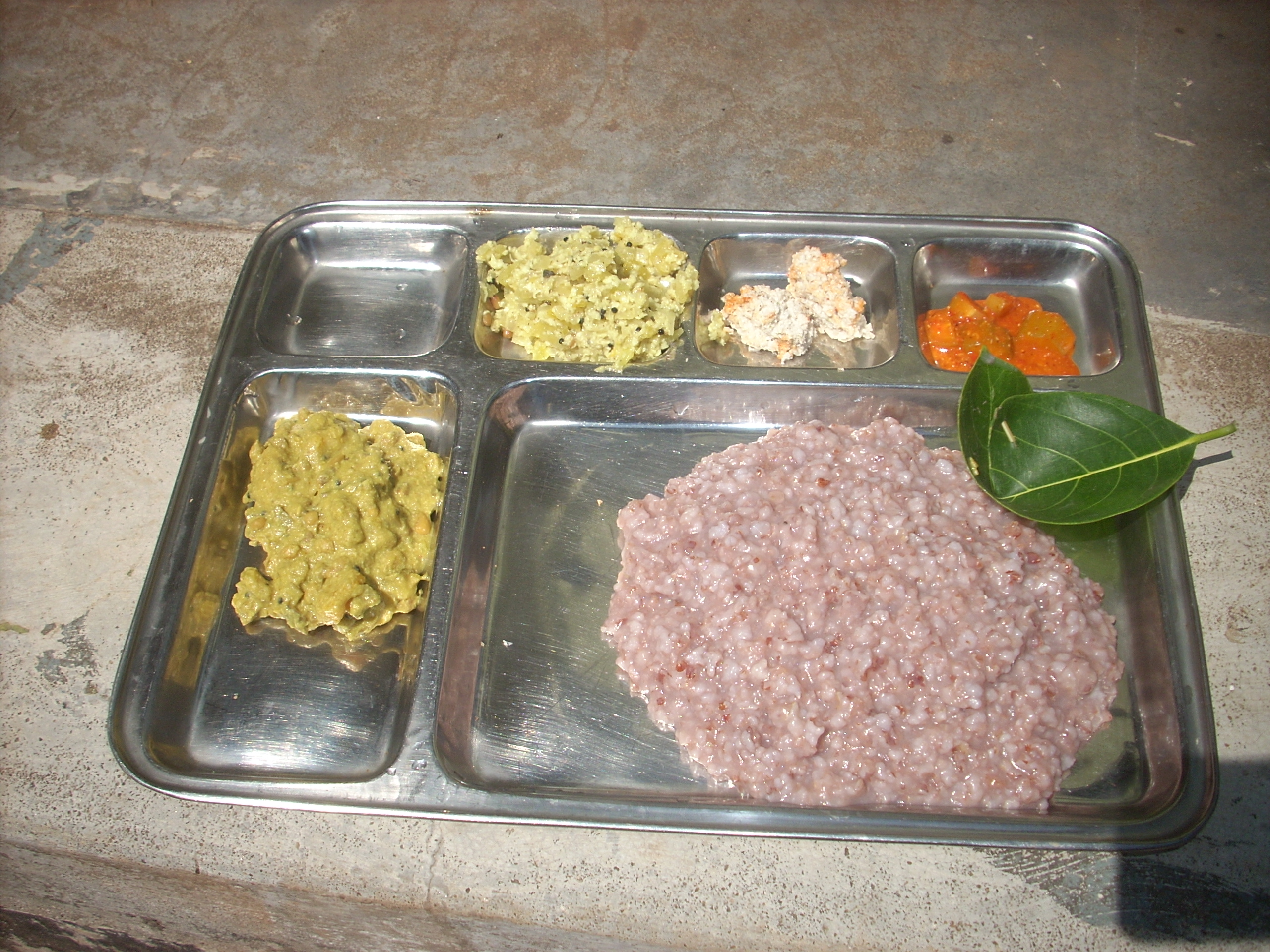 തവളക്കണ്ണന്‍ അരിയുടെ ചോറ്. നാടന്‍ വിത്ത് സംരക്ഷണ സന്ദേശ യാത്ര 2012, കേരളവര്‍മ്മ, തൃശ്ശൂര്‍ This media file is uploaded with Malayalam loves Wikimedia event - 2.